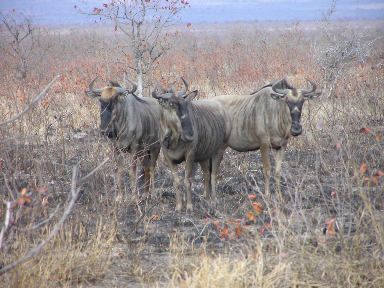 Streifengnus im südafrikanischen Krugerpark